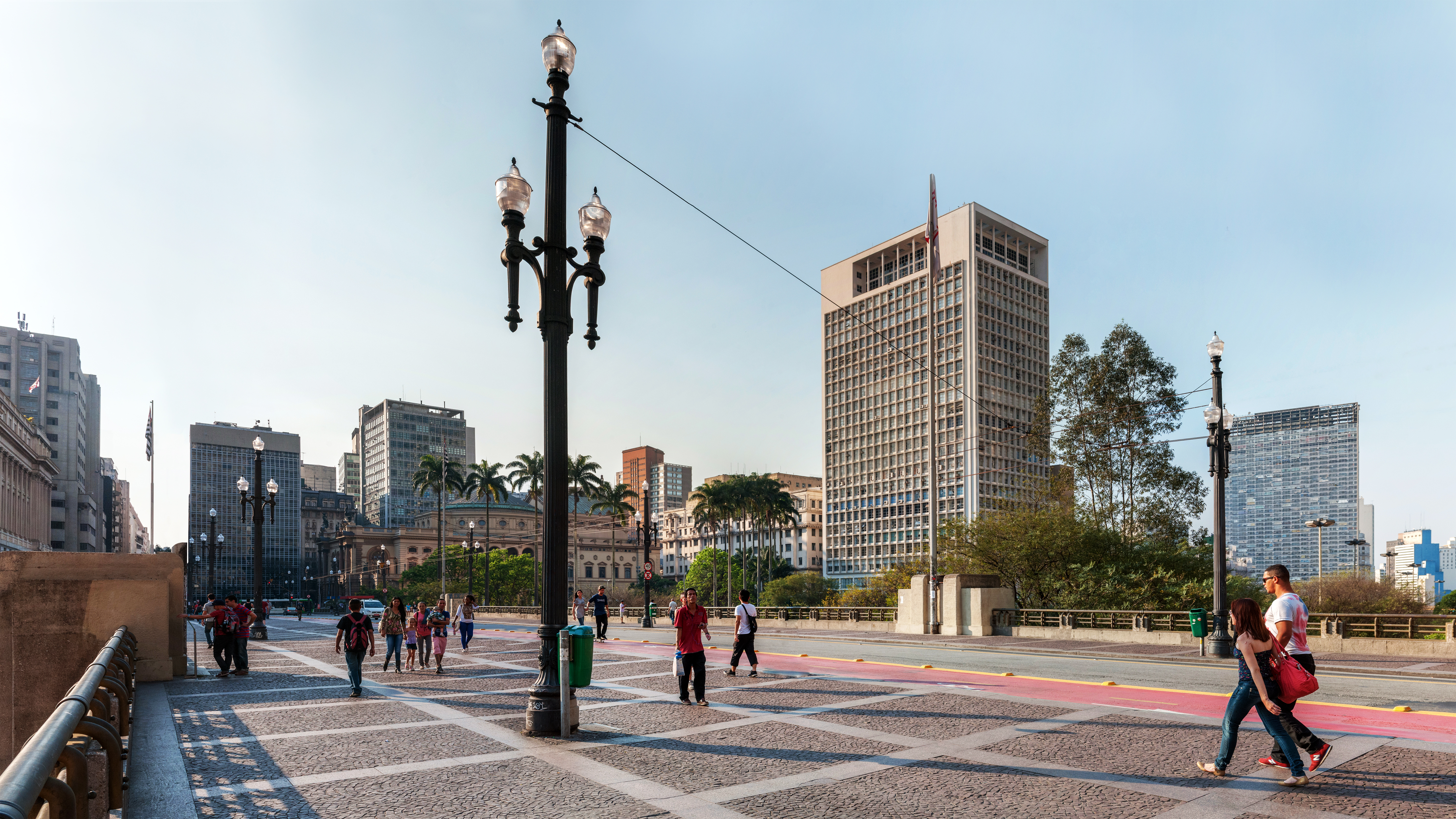 Distribuidor da Chá